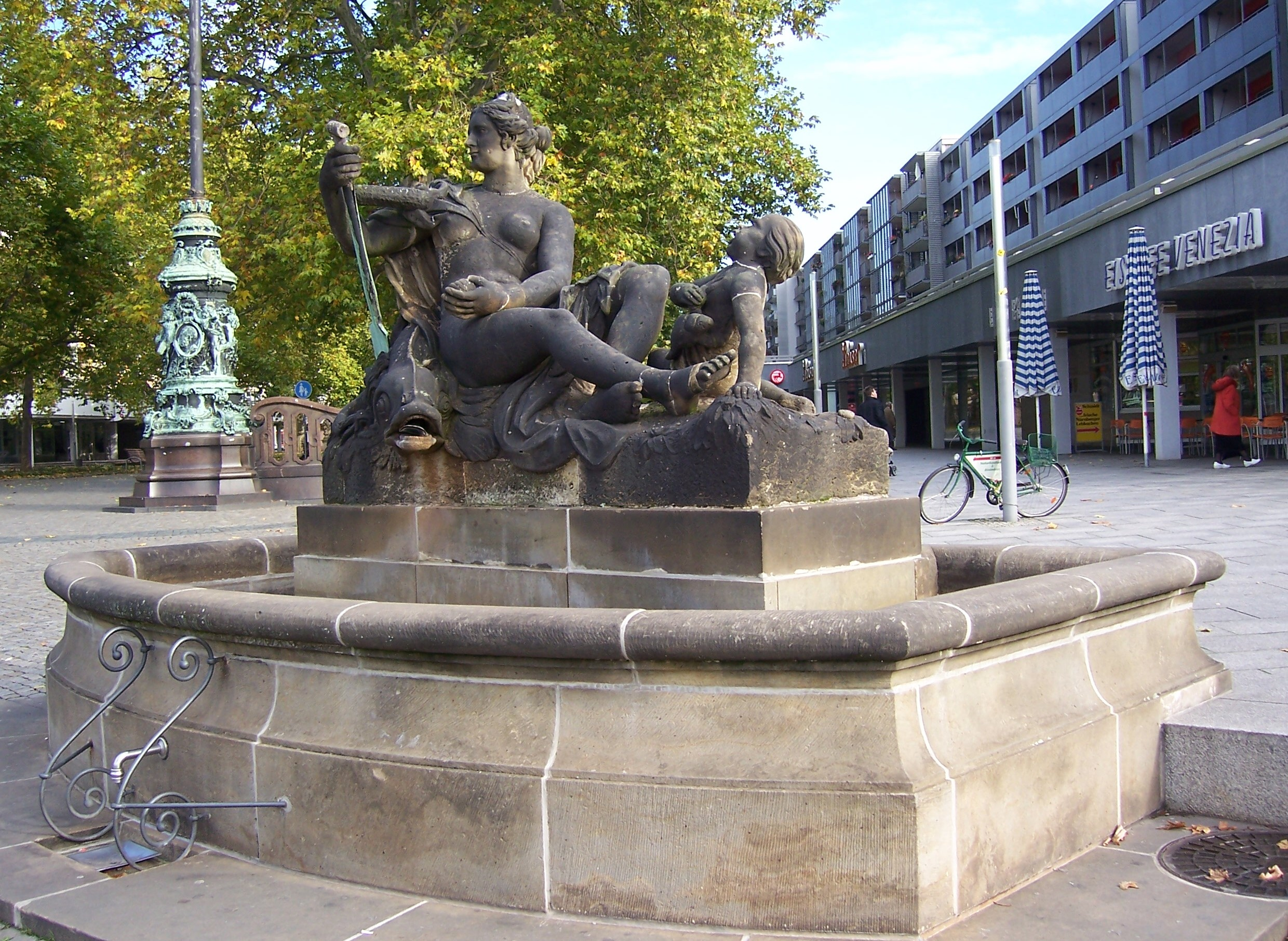 Nymphenbrunnen auf dem Neustädter Mark in Dresden. Das Original stammt von Johann Benjamin Thomae. Die verwitterten Originale wurden 1938 durch Kopien ersetzt.